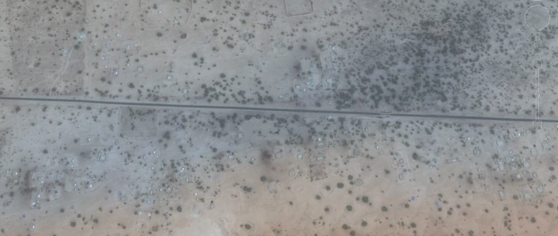 صورة جوية